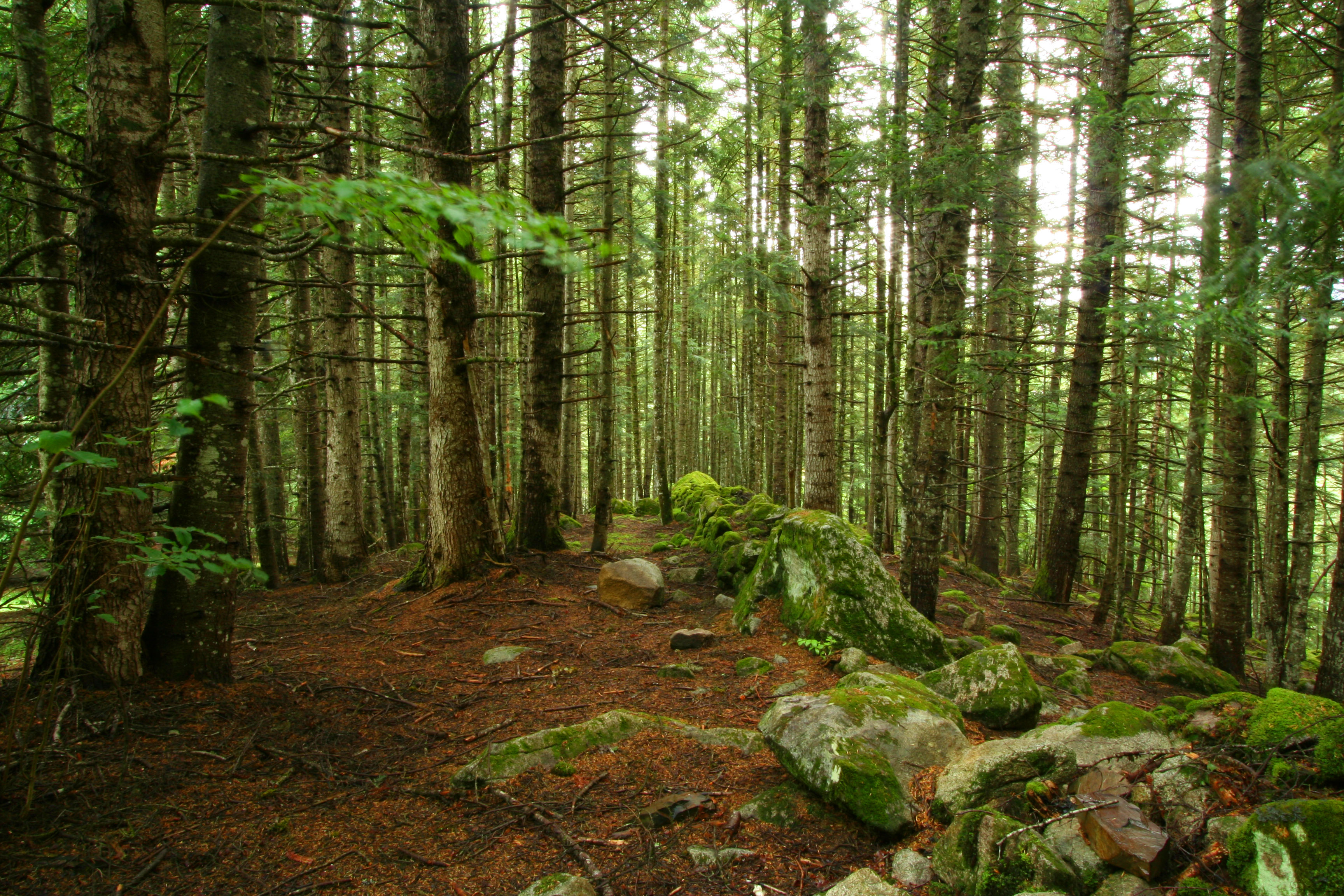 Bosc del Gerdar, Alt Àneu (Pallars Sobirà)